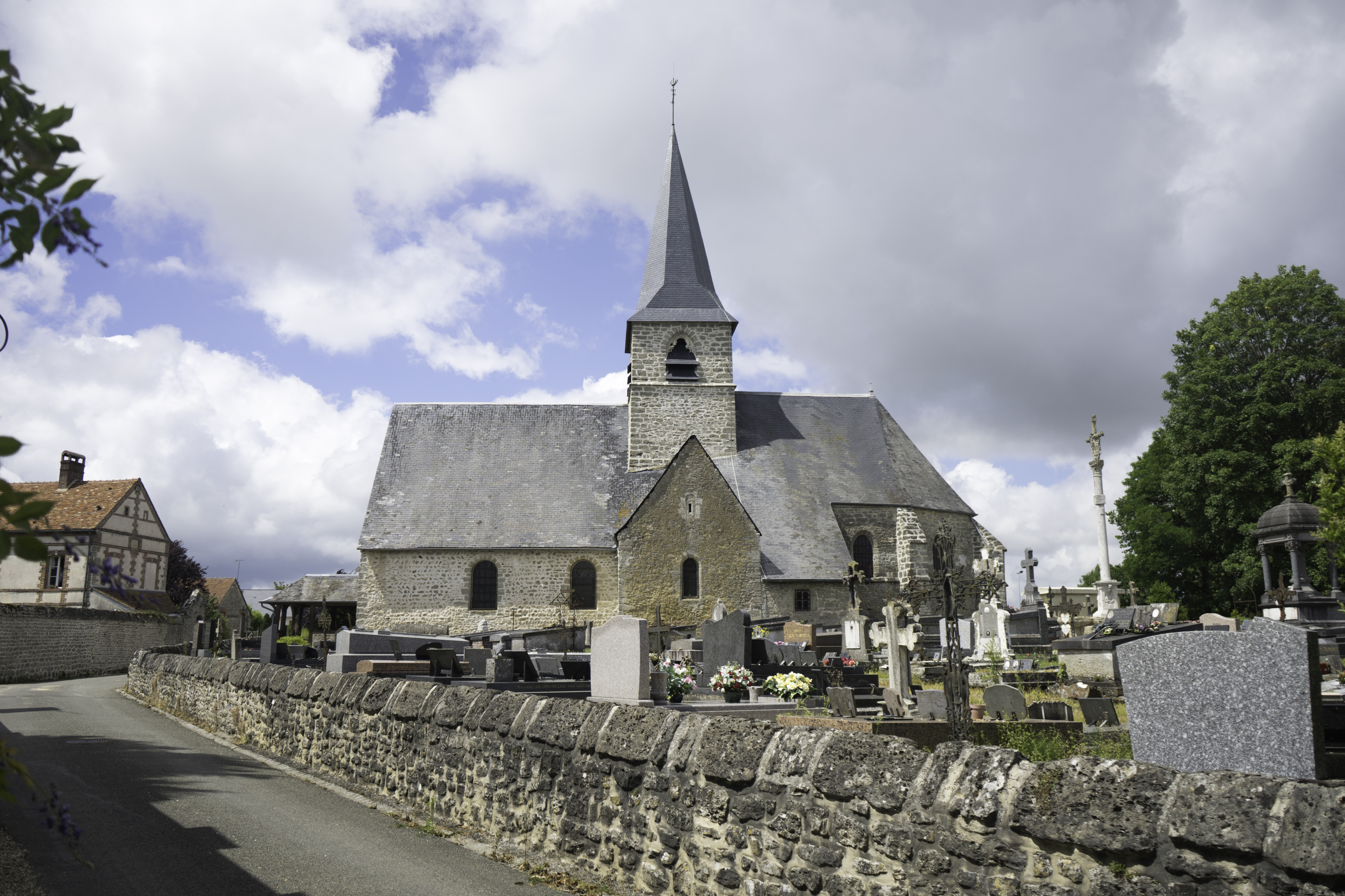 Eglise Saint-Martin à Cuy-Saint-Fiacre